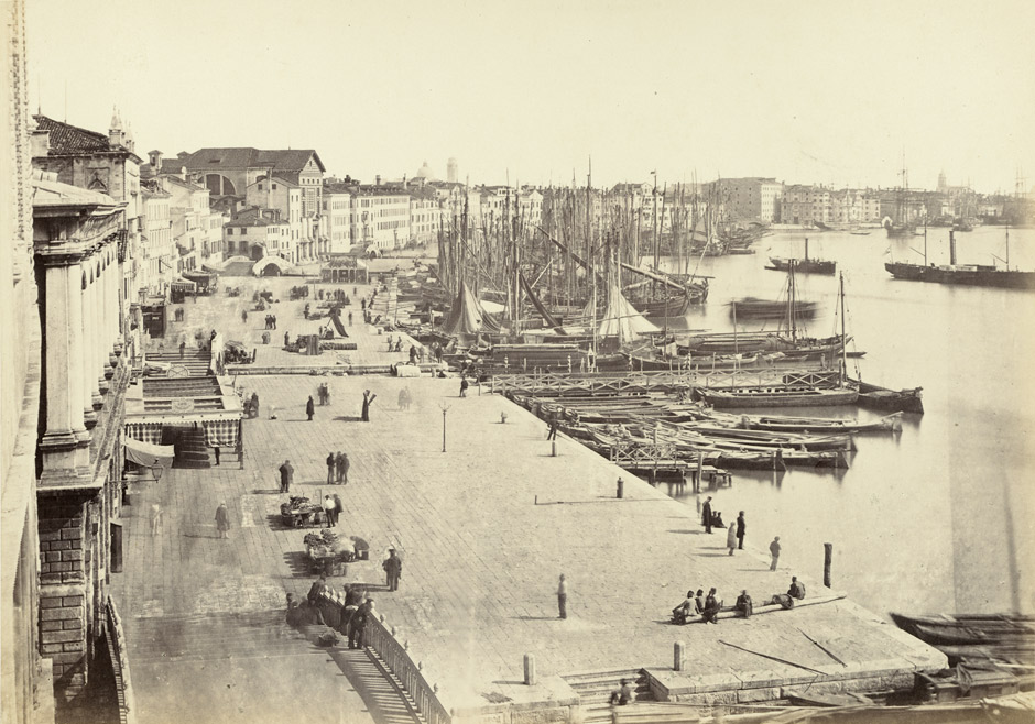 Riva degli Schiavoni, Venice. 1850s.